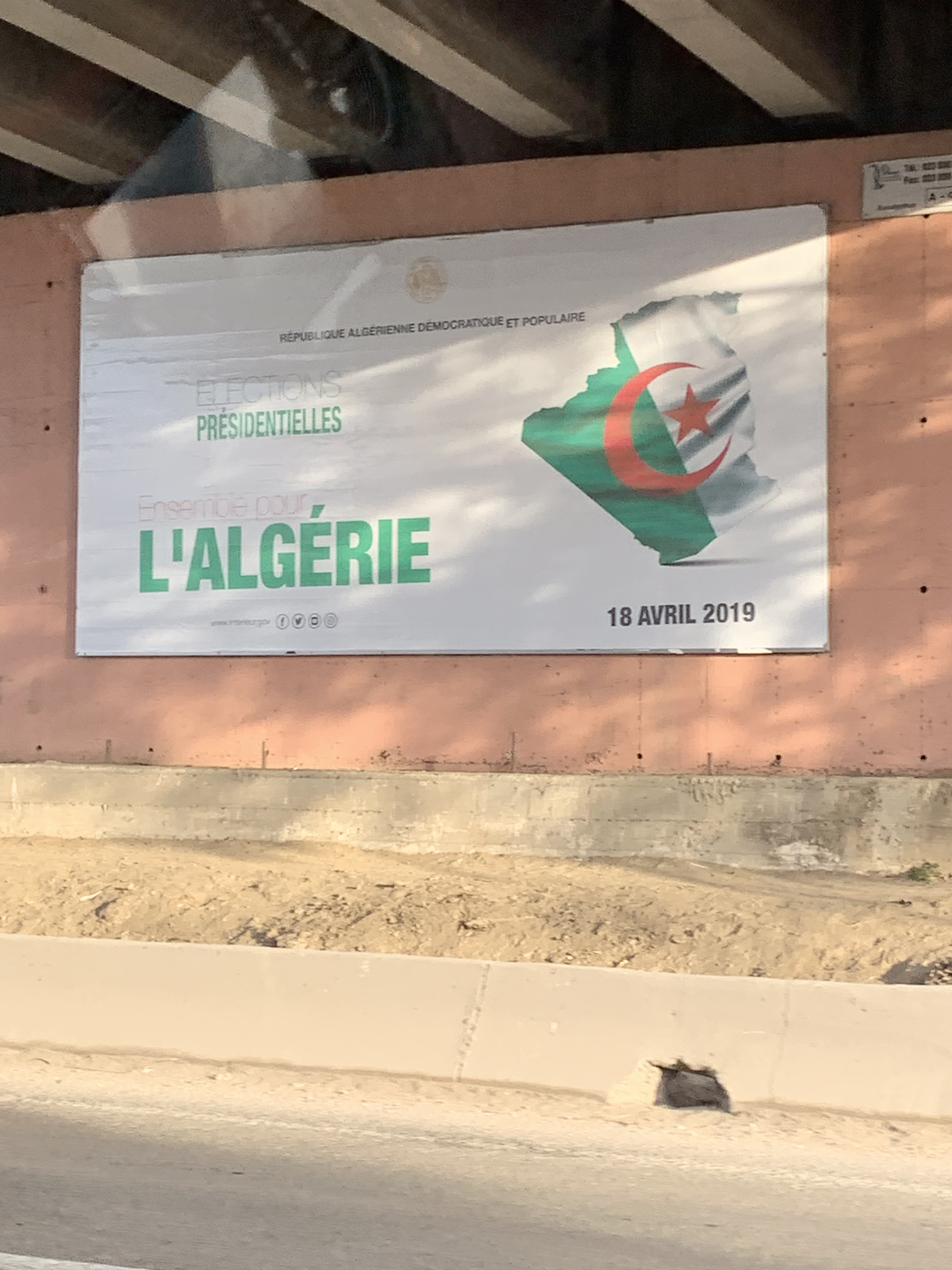 Poster announcing the Algerian presidential elections. March 2019